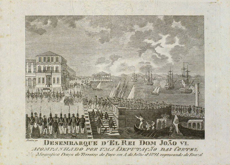 Desdembarque de Dom João VI em Portugal em seu regresso do Brasil